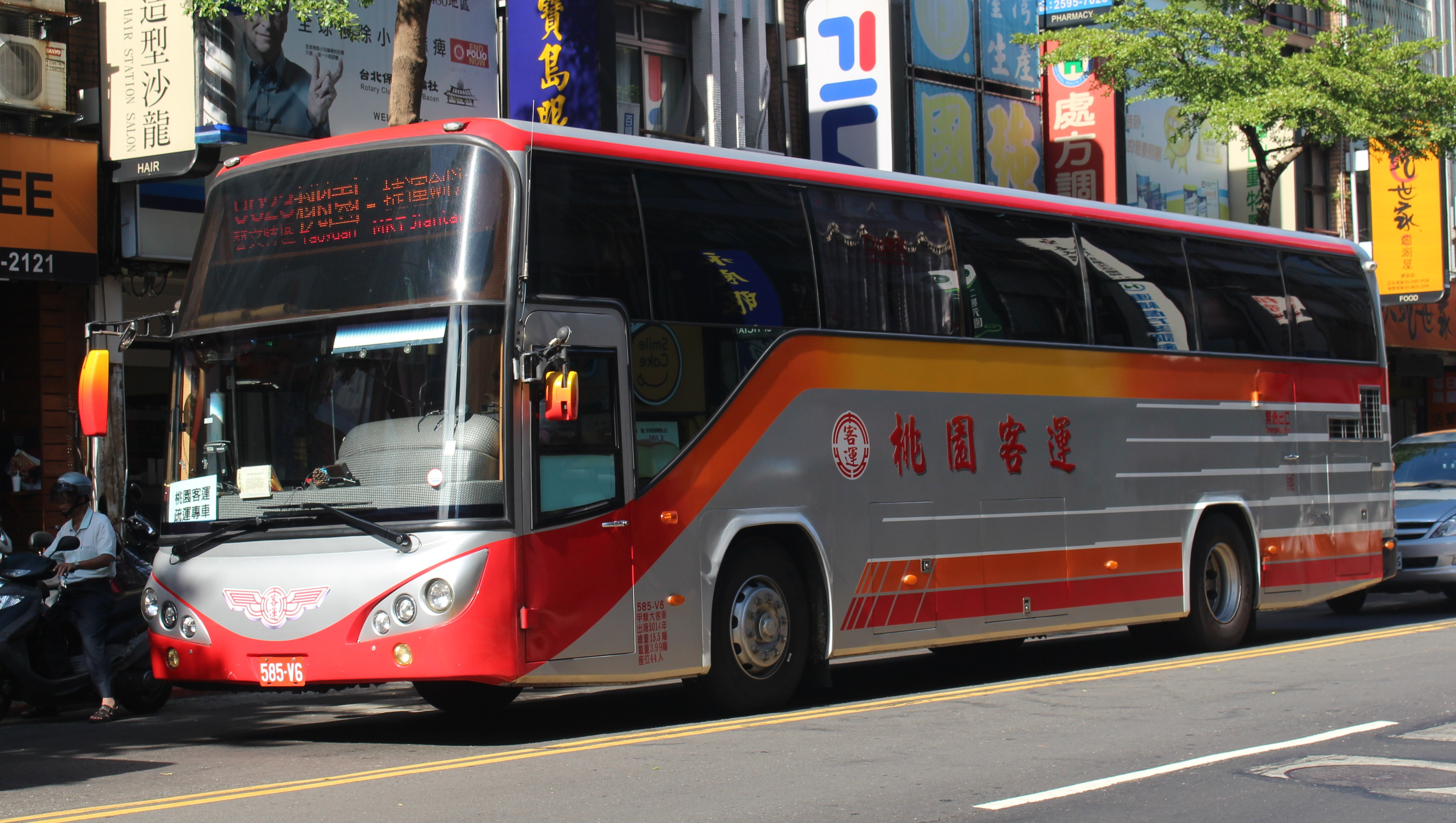 桃園客運 2015 Fuso RM11FN1XA 585-V6 9023